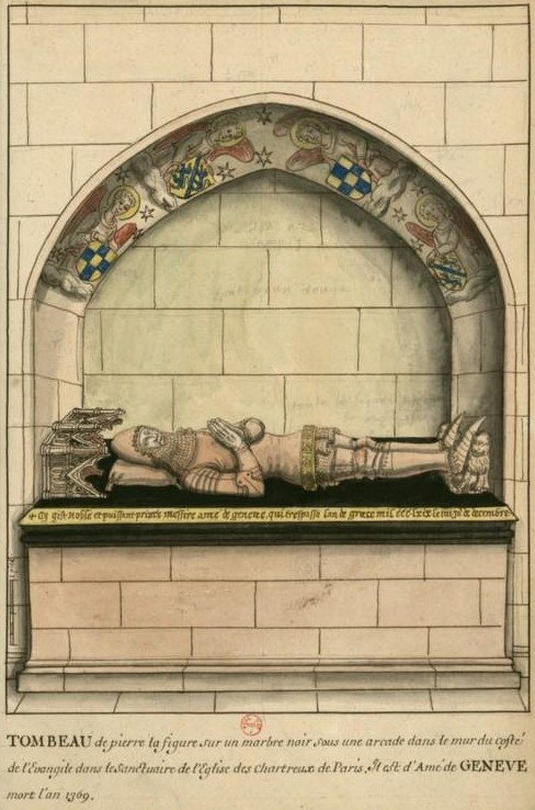 Amédée IV de Genève